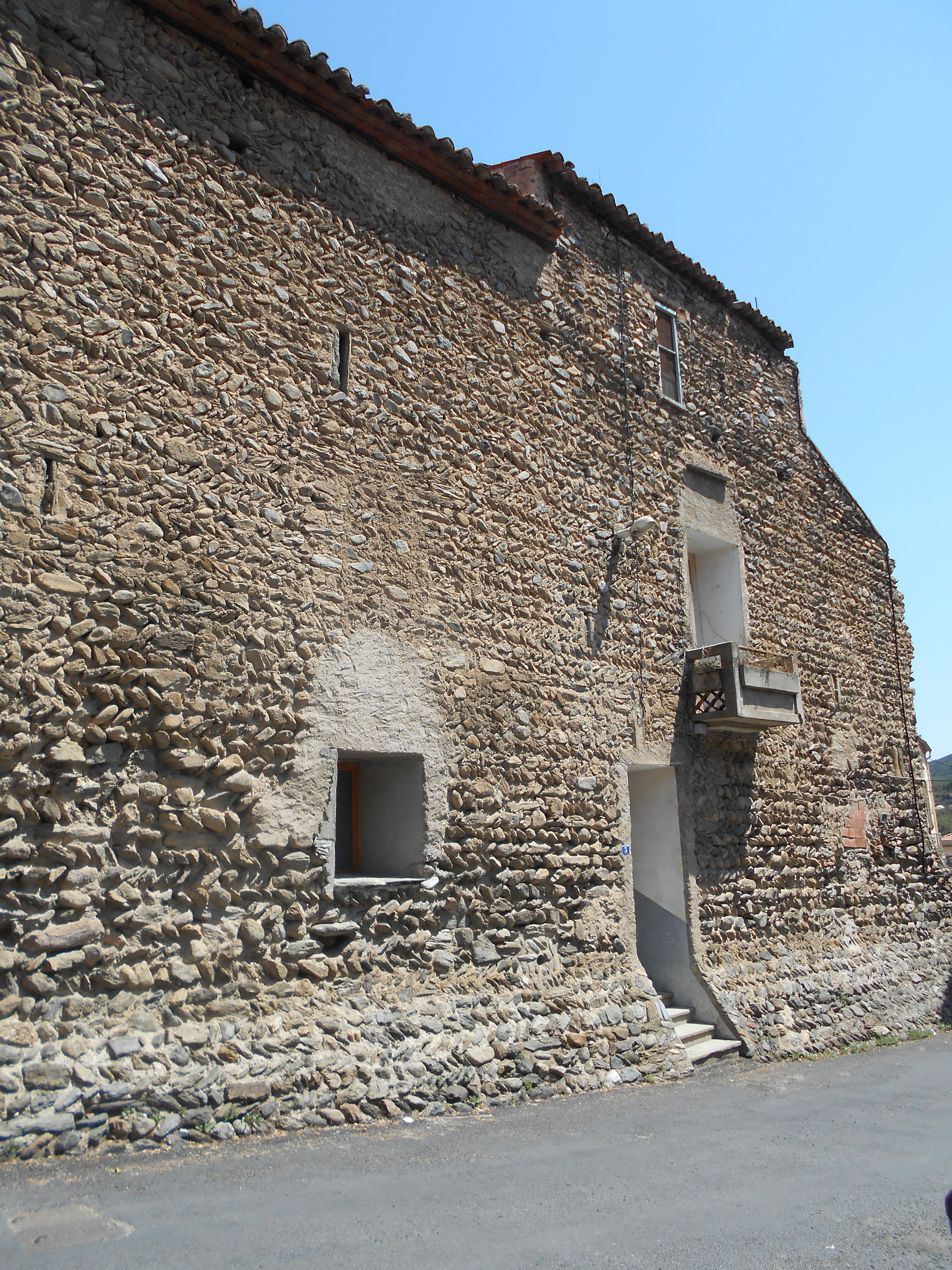 Muralles de Bulaternera